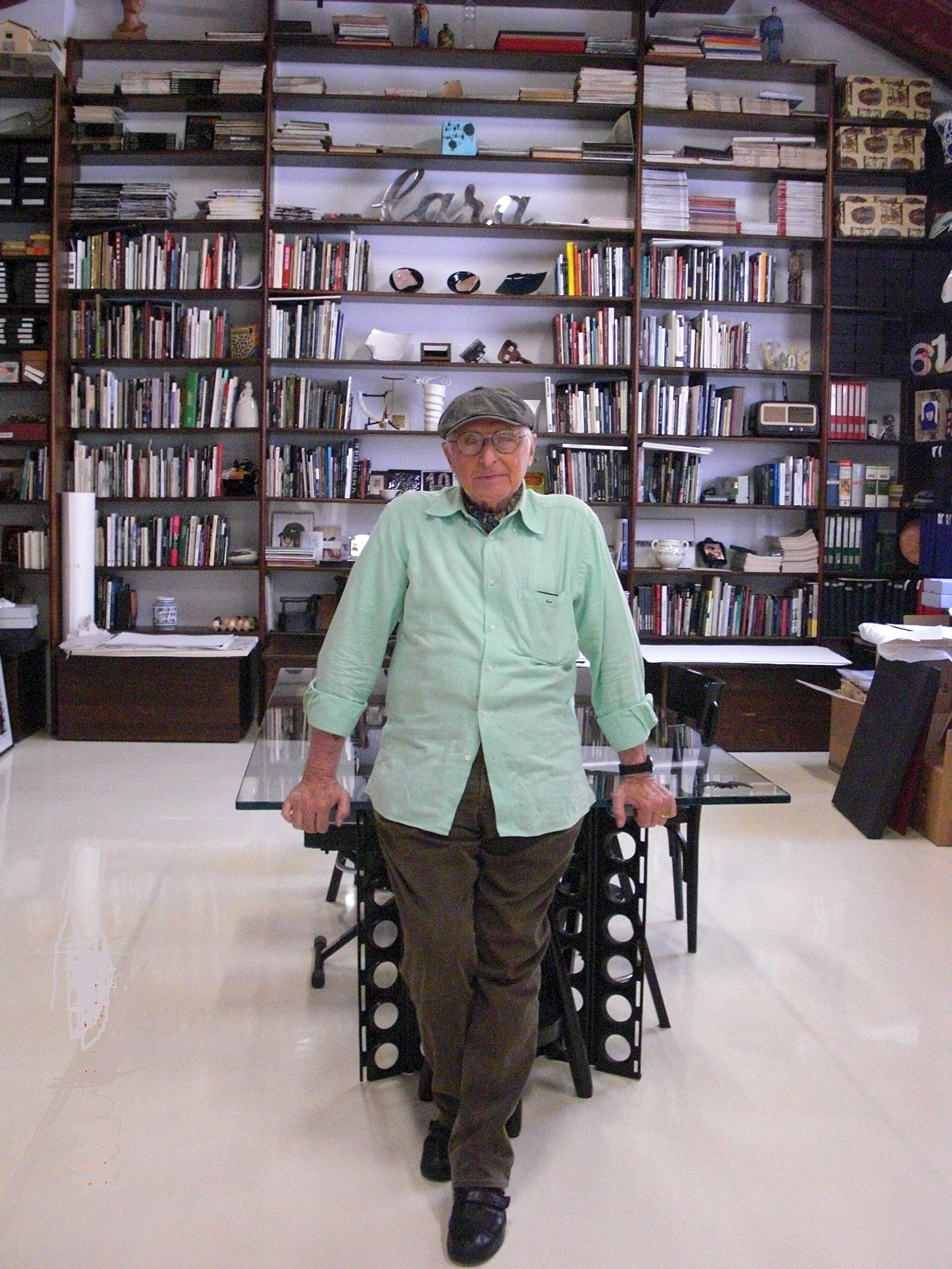 Giugno 2016. Nino Migliori nel suo studio.